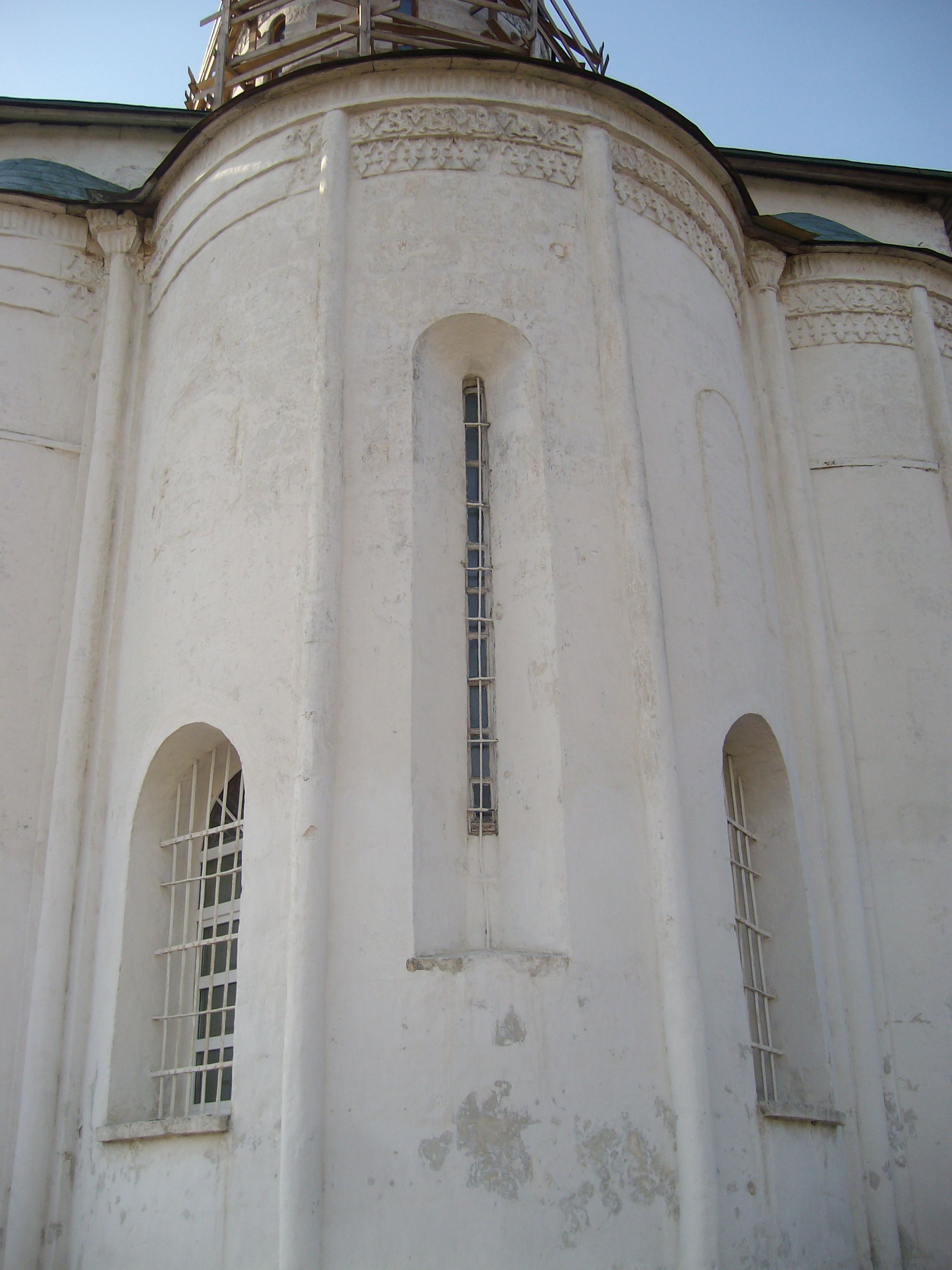 Успенский собор на Городке в Звенигороде. Около 1399 года.